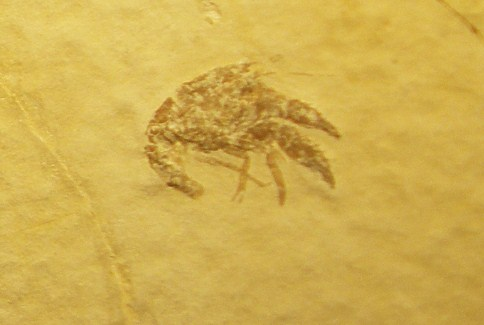 Fossil of Palaeastacus, an extinct crustacean Took the photo at Musee d'Histoire Naturelle, Brussels